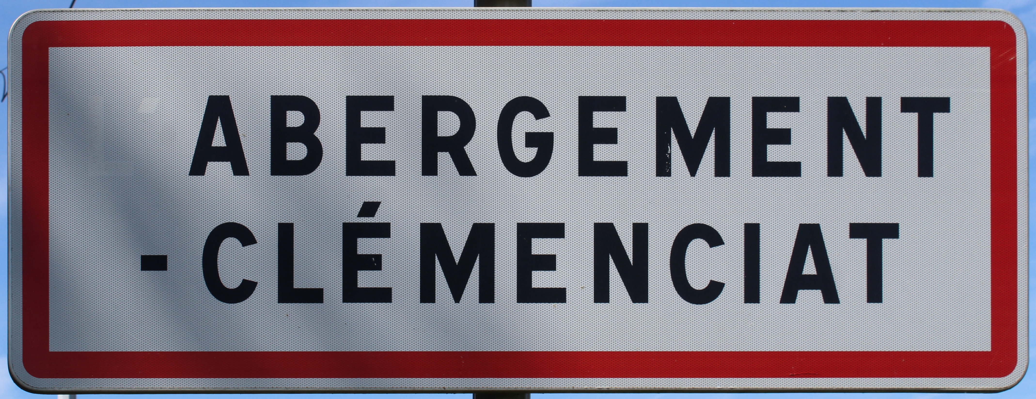 Panneau d'entrée dans le village de L'Abergement-Clémenciat. À noter que le nom noté est Abergement-Clémenciat, on voit que le L et l'apostrophe ont été enlevés.